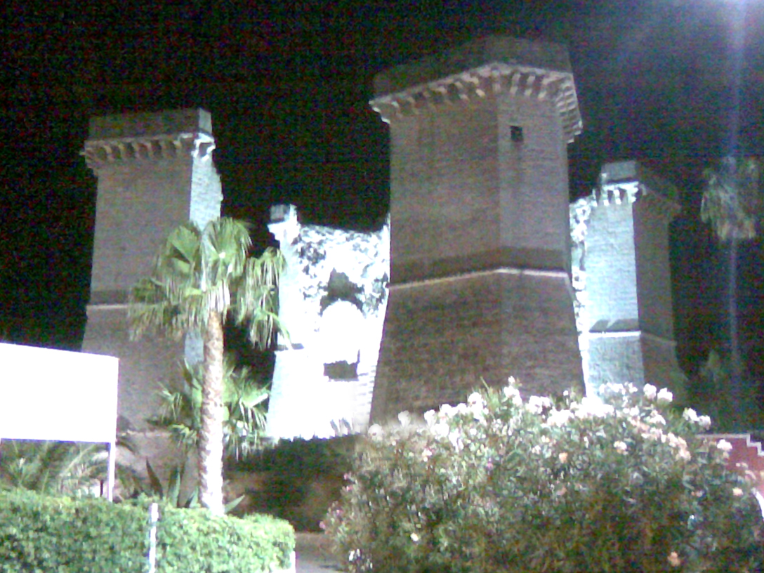 immagine notturna con il cellulare delle quattro colonne a Santa Maria al bagno